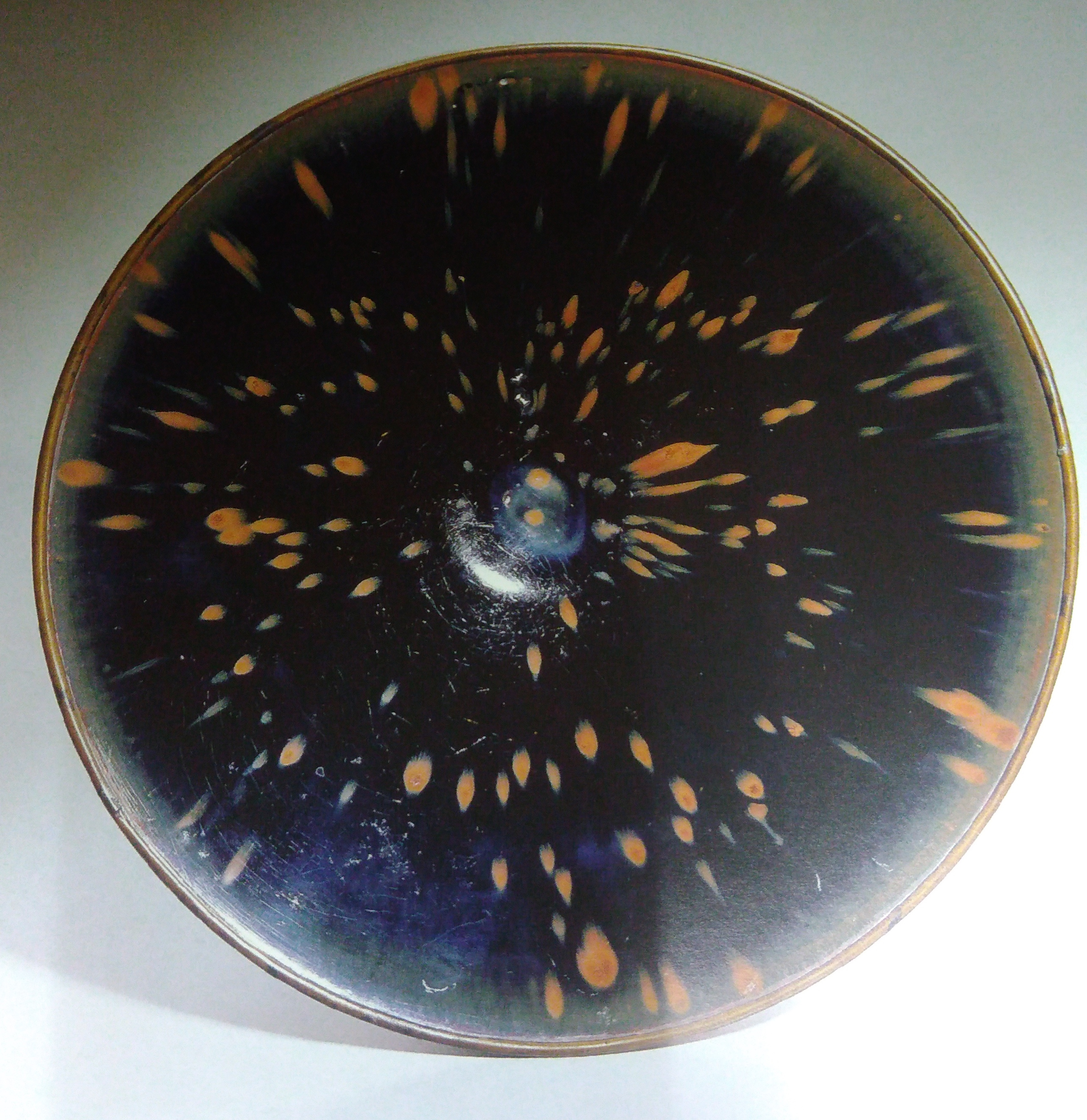 裡心放射向外醬柿色點